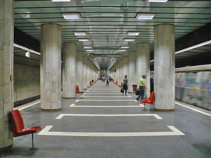 Le quai de la station Păcii de la ligne M3 du métro de Bucarest.